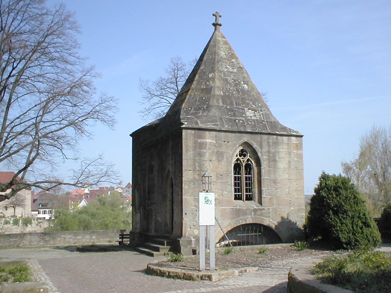 Regiswindiskapelle in Lauffen am Neckar